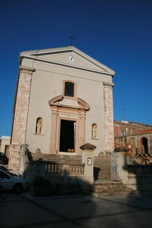 Chiesa Madre di Villafranca Tirrena (MESSINA) San Nicolò di Bari, rione "Castello"